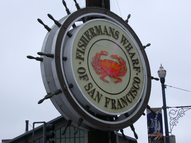 El famoso barrio de Fisherman's Wharf de San Francisco